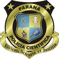 Brasão da Polícia Científica do Paraná